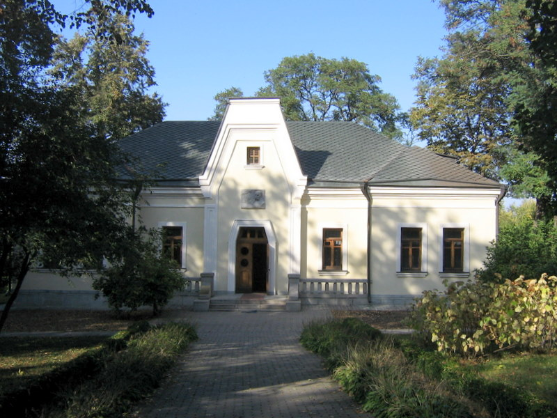 Літературно-меморіальний музей Тараса Шевченка в селі Шевченкове